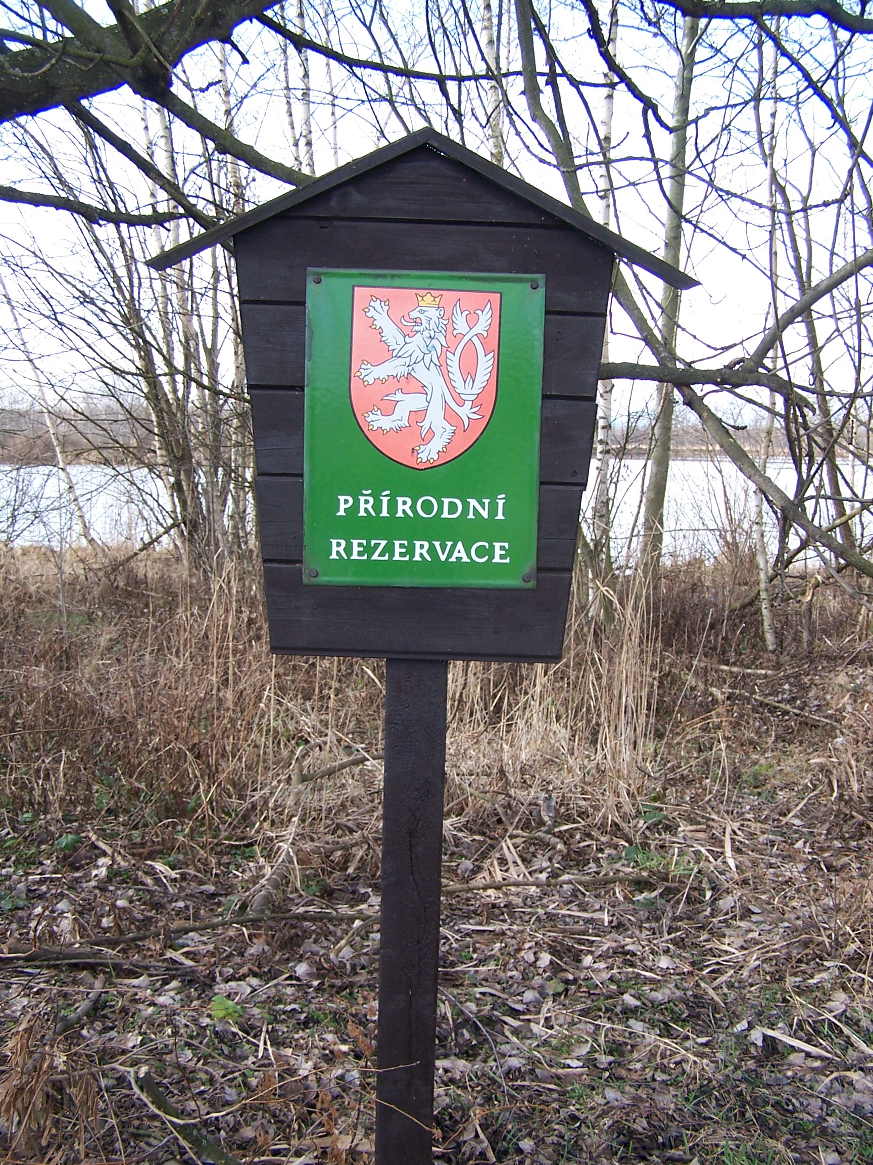 Cedule Přírodní rezervace